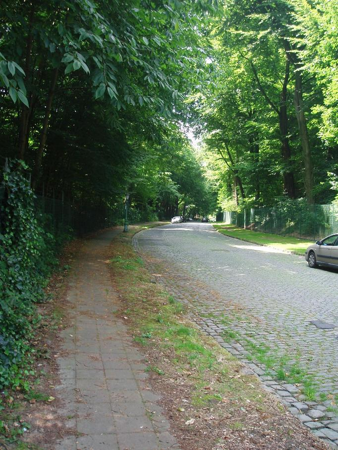 avenue Valduchesse Auderghem Belgium